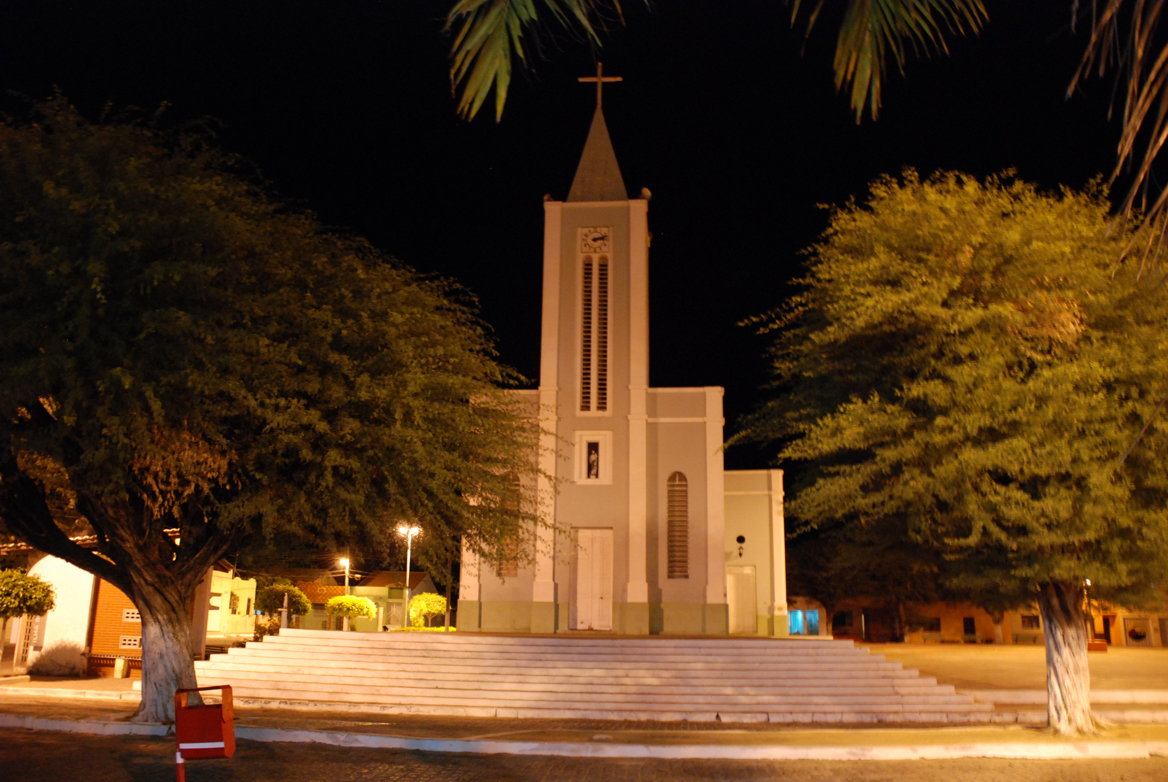 Igreja Matriz - Potengi - Ceará, Brasil